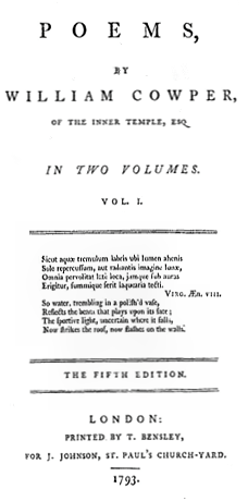 Portada de Poems.